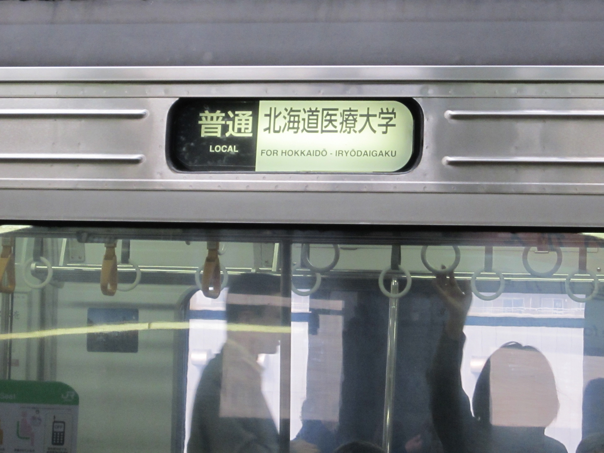 キハ201系方向幕